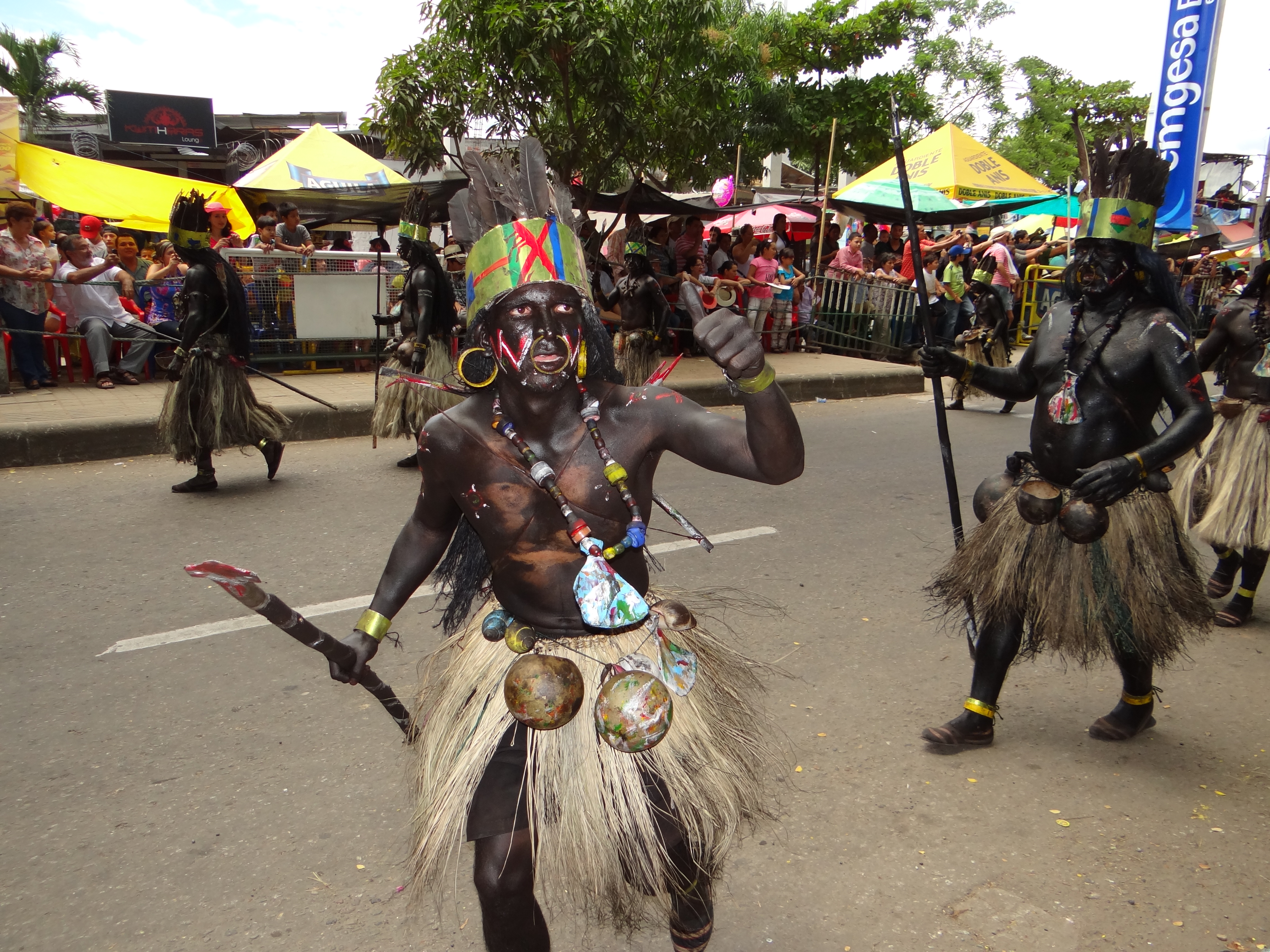 Fiestas de San Pedro en Neiva